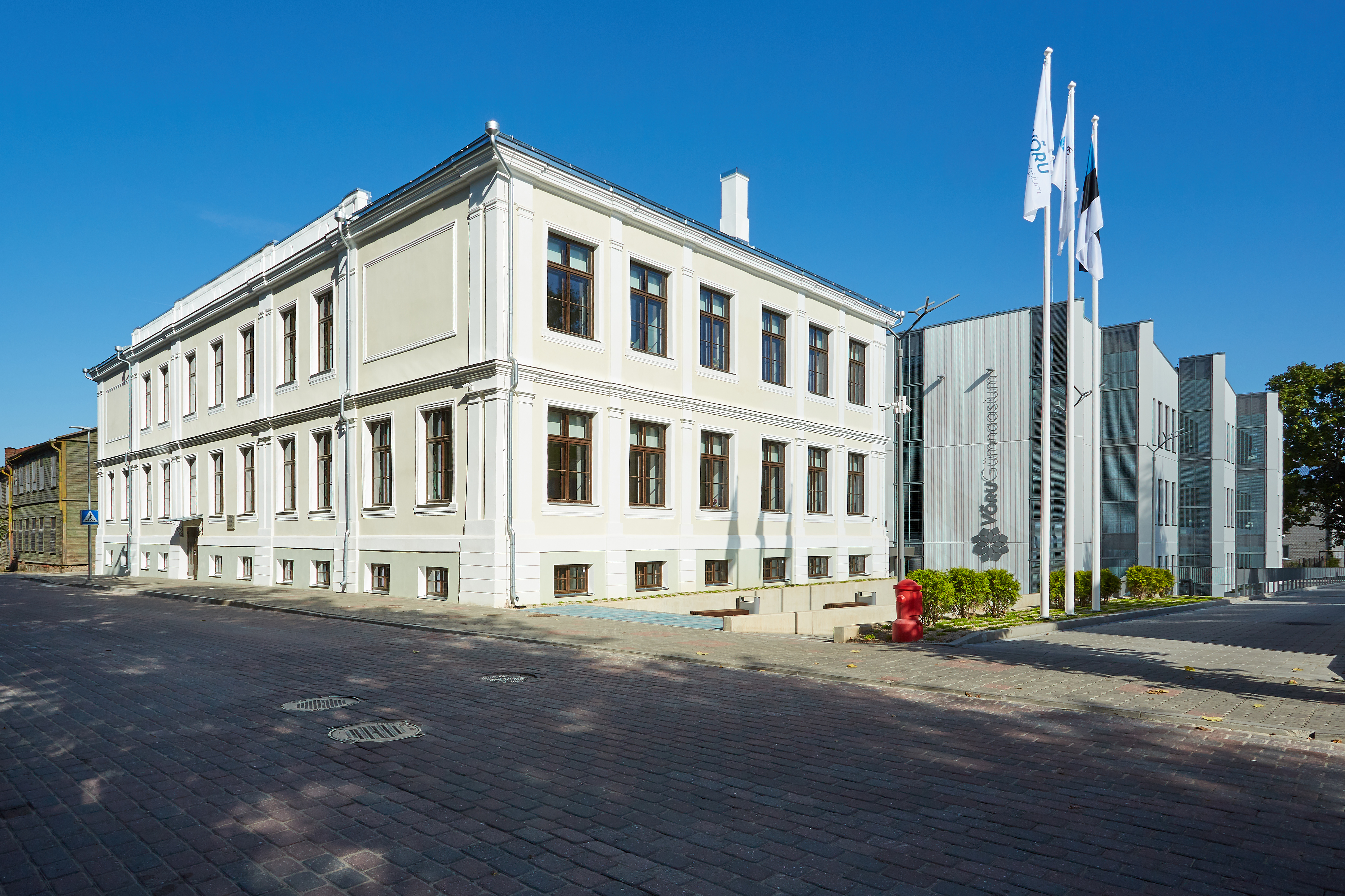 Võru Gümnaasiumi hoone peale renoveerimist 2015. aastal.